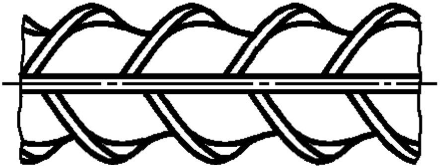 Рифлёный профиль арматуры А-III (А400) ГОСТ 5781-82